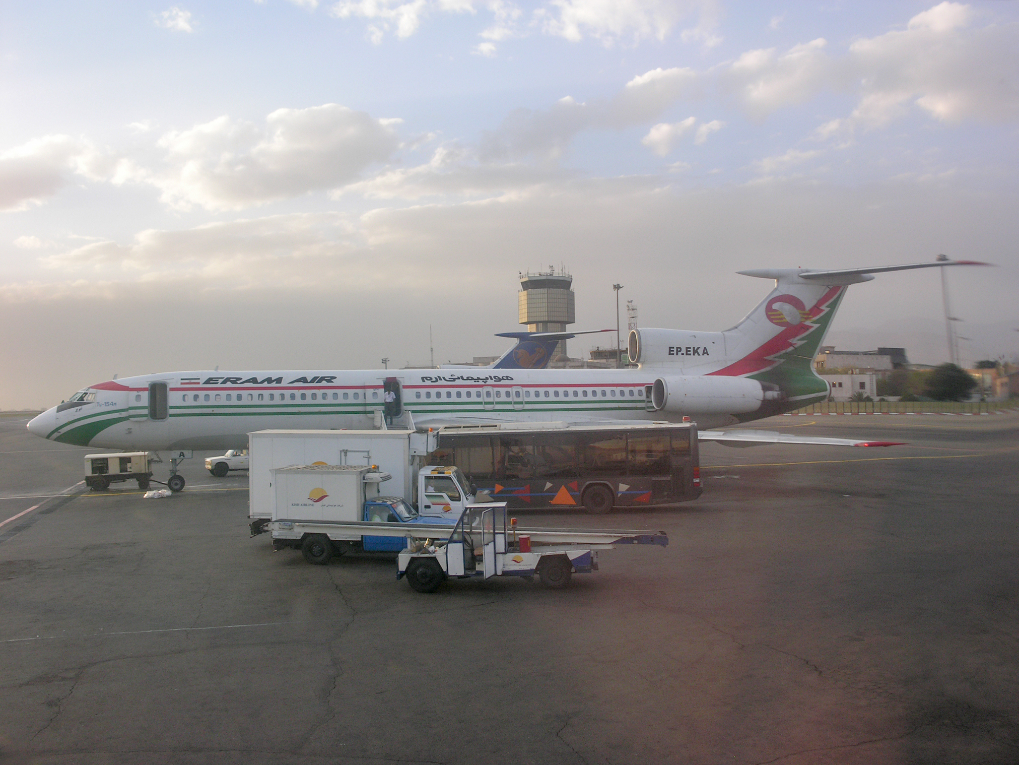 Iran, TU-154M at Tehran's Mehrabad airport